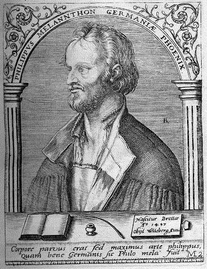 Philip Melanchton oder Melanchthon (1497-1560); Humanist, Reformator